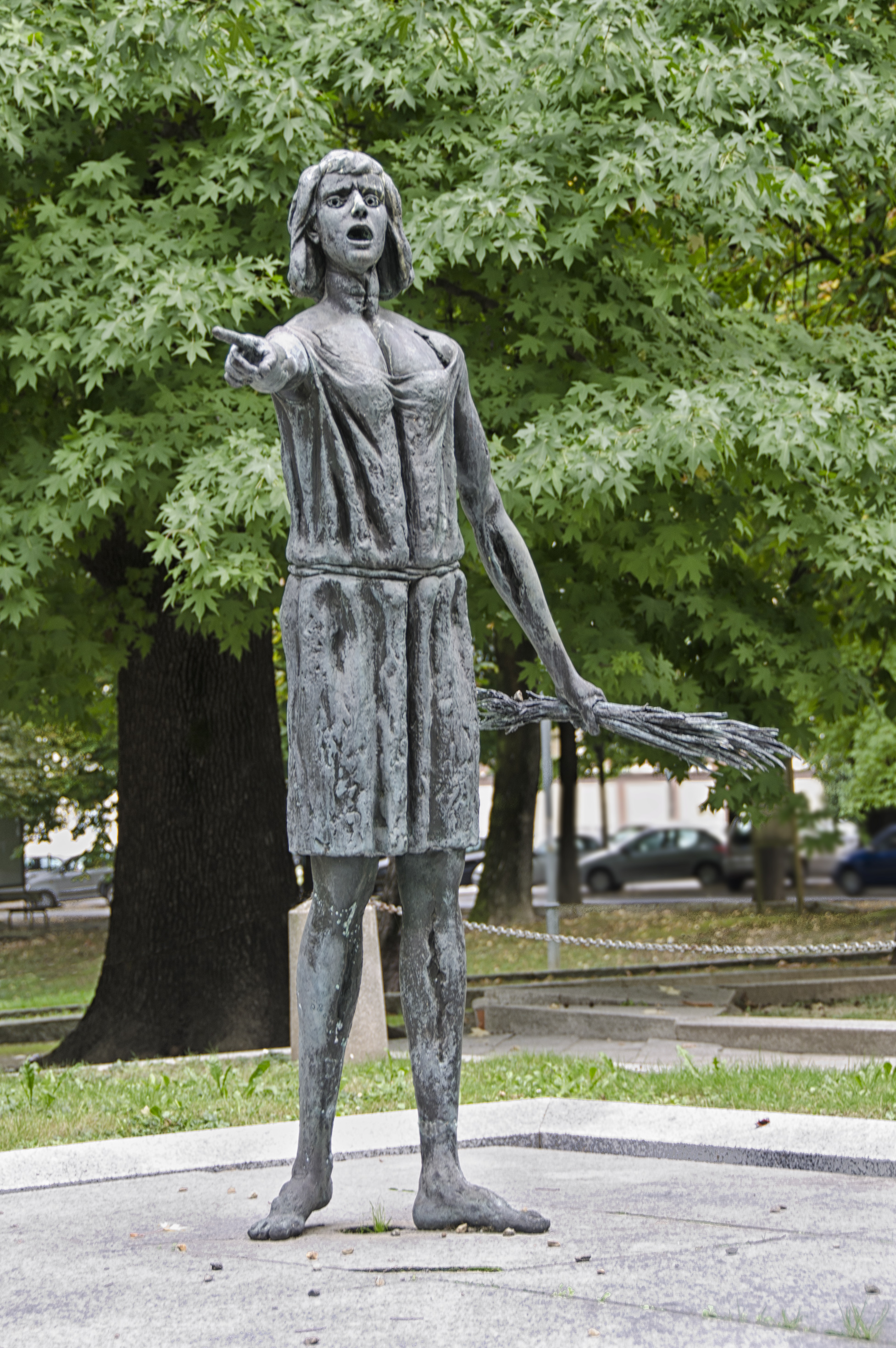 Monumento alla mondina This is a photo of a monument which is part of cultural heritage of Italy.